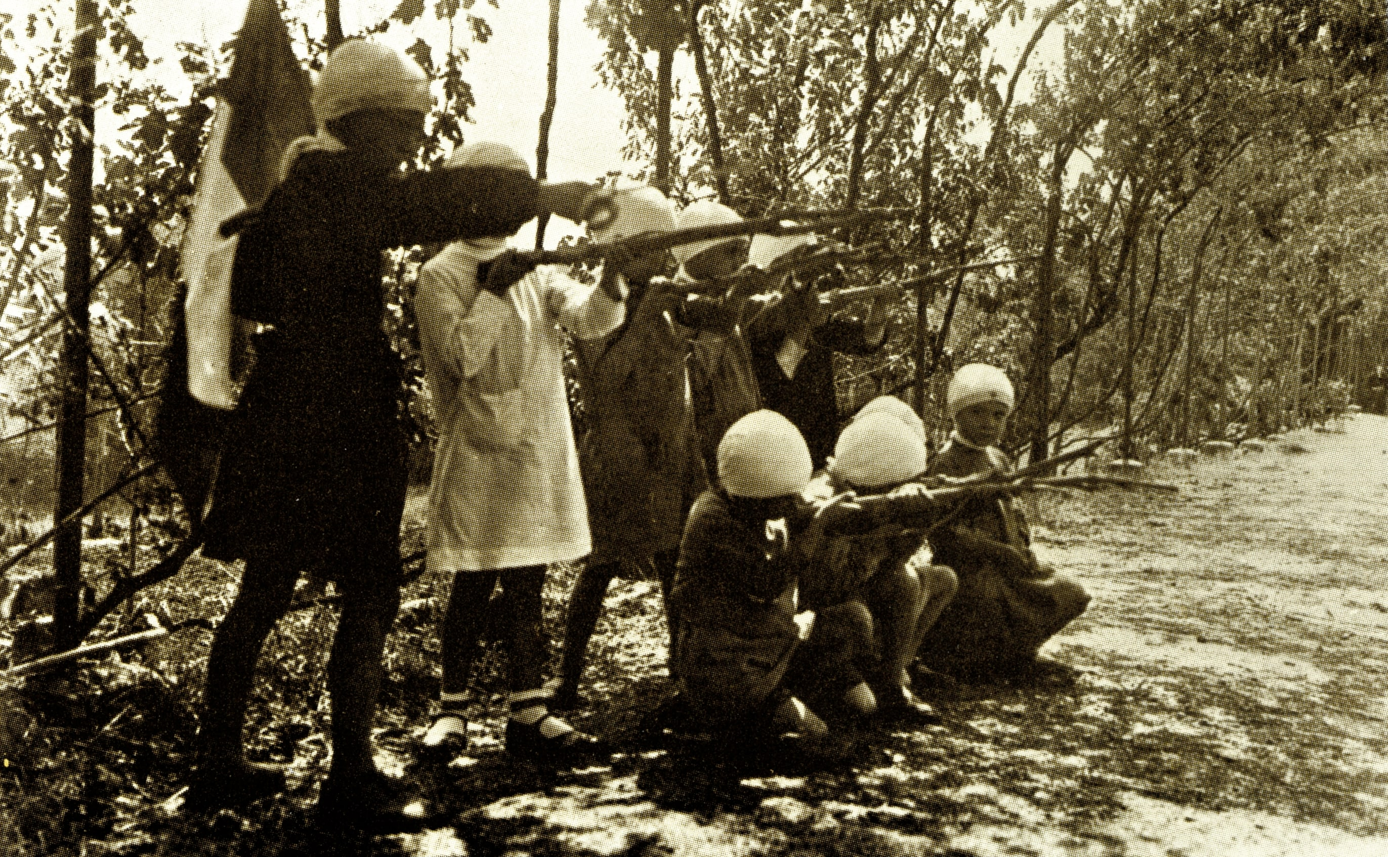 I piccoli pazienti dell'IDI che giocano "alla guerra" (1940 circa)